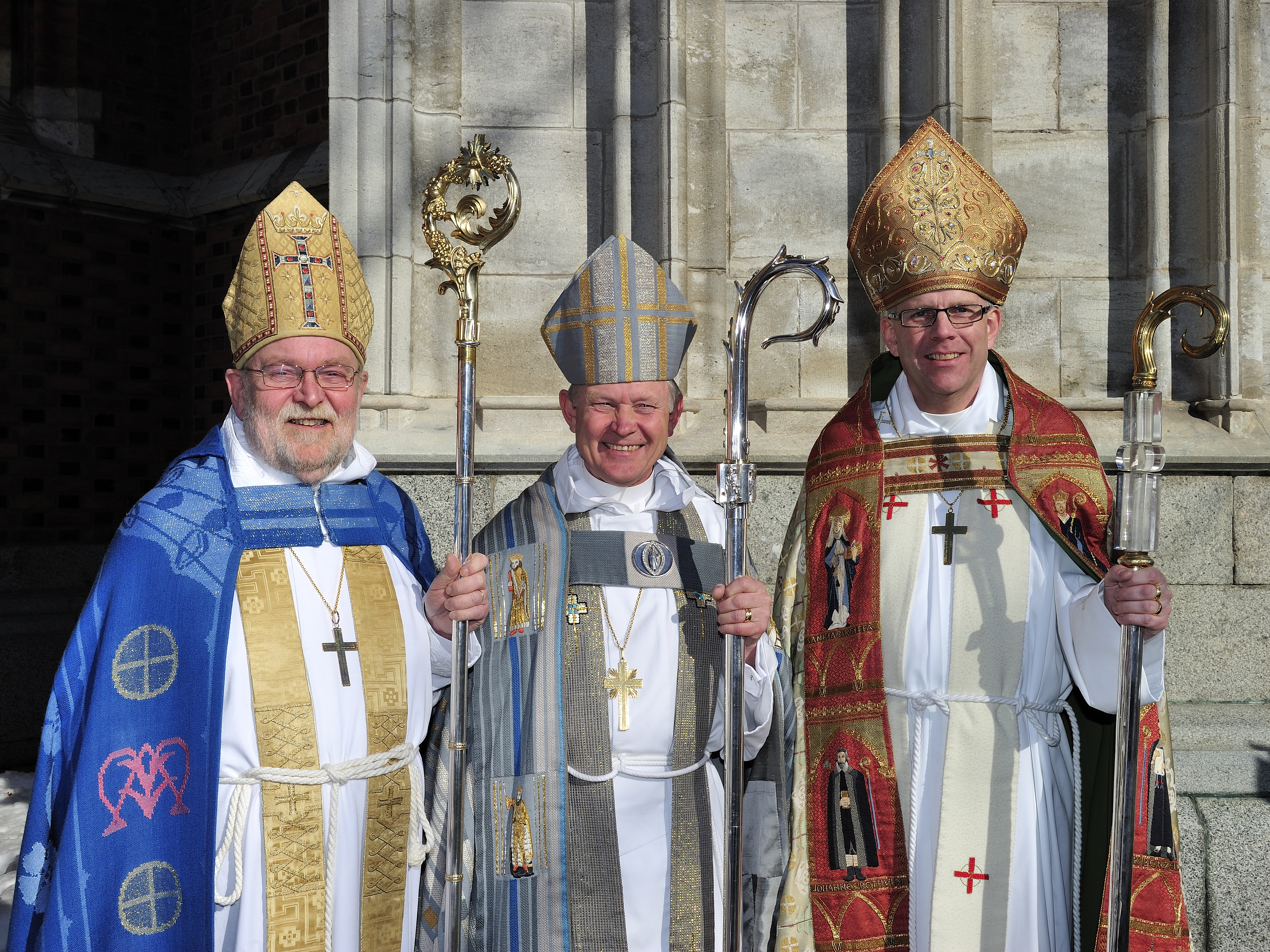 Biskopsvigning i Uppsala domkyrkan 6 mars 2011.Fr v: Sven-Bernhard Fast, ny biskop i Visby stift, ärkebiskop Anders Wejryd, Martin Modéus, ny biskop i Linköpings stift.